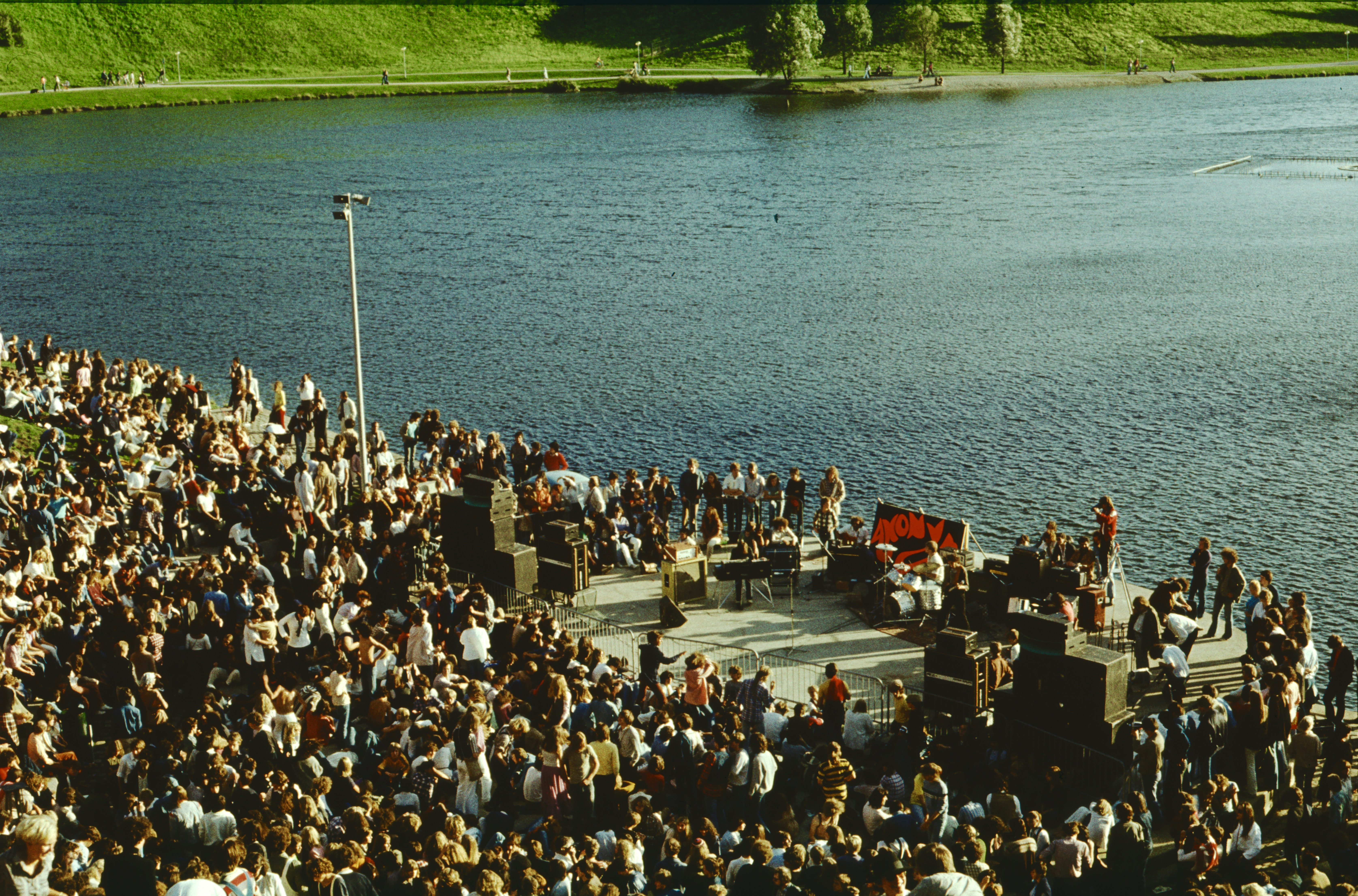 Im Sommer gab es am Sonntagnachmittag Konzerte mit Münchner Bands und anderen Gruppen. Das Foto entstand 1977 oder 1978